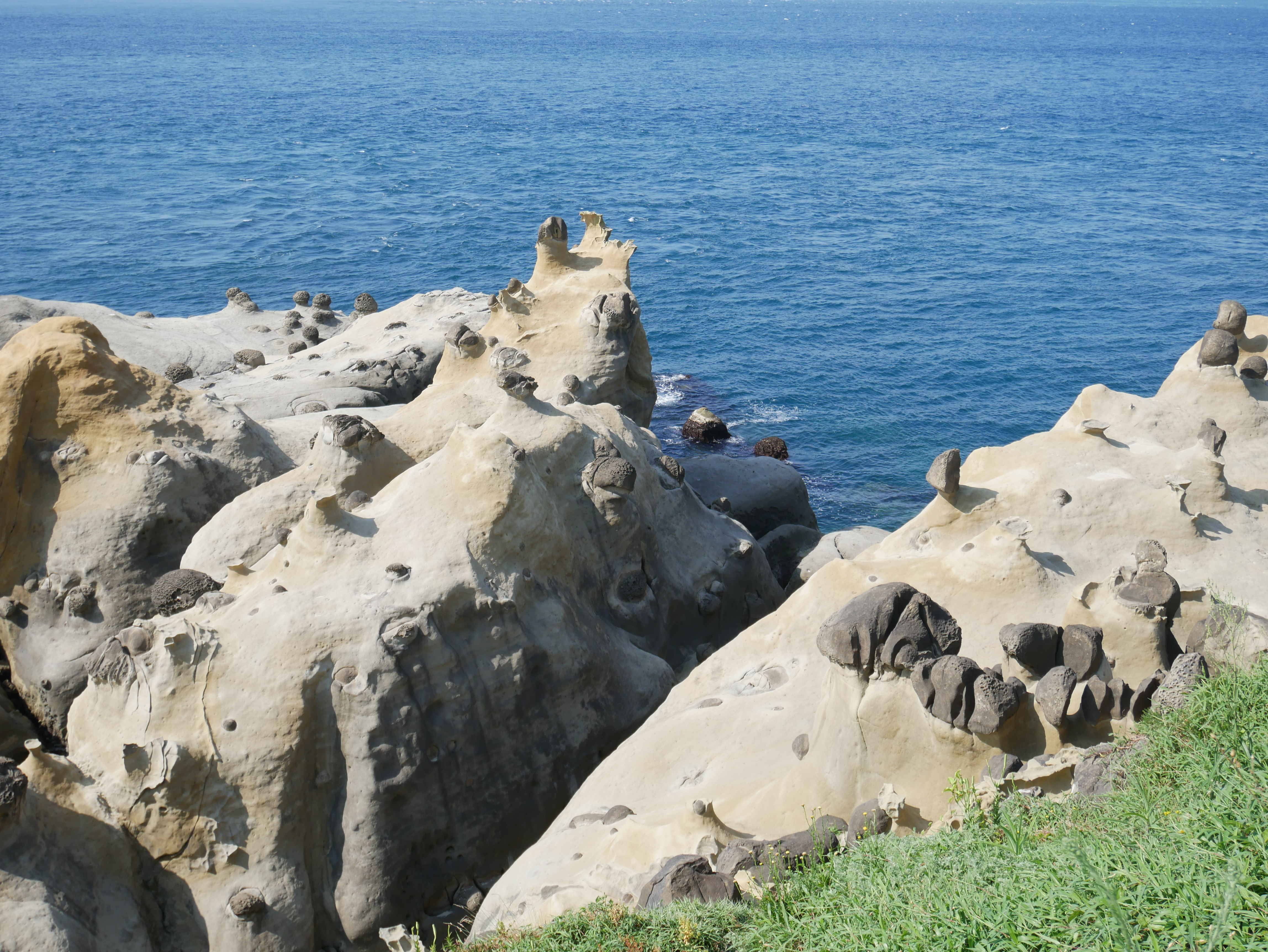 中文（台灣）: 和平島公園犀牛望月與海蝕溝，基隆市中正區平寮里